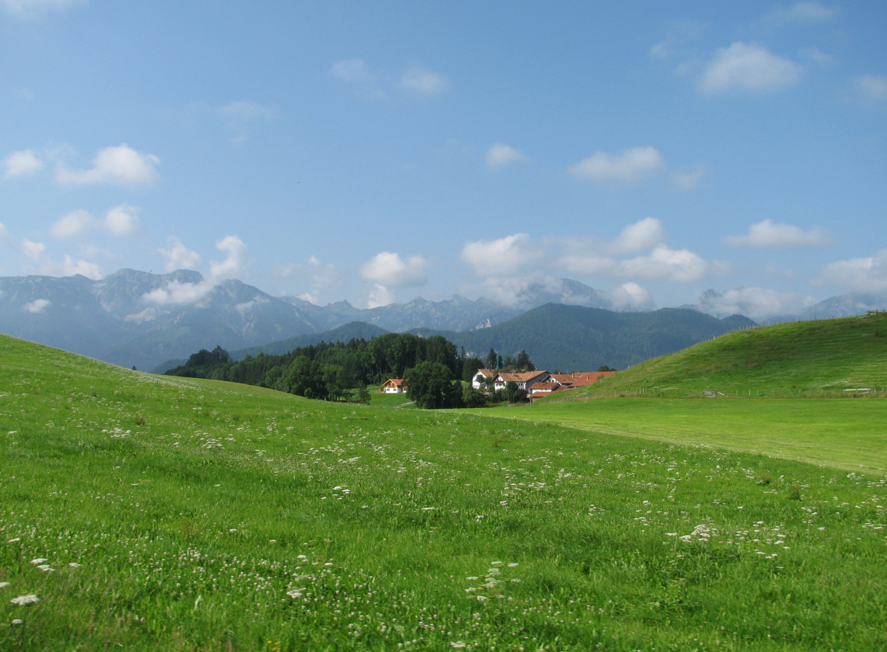 Allgäu-Landschaft